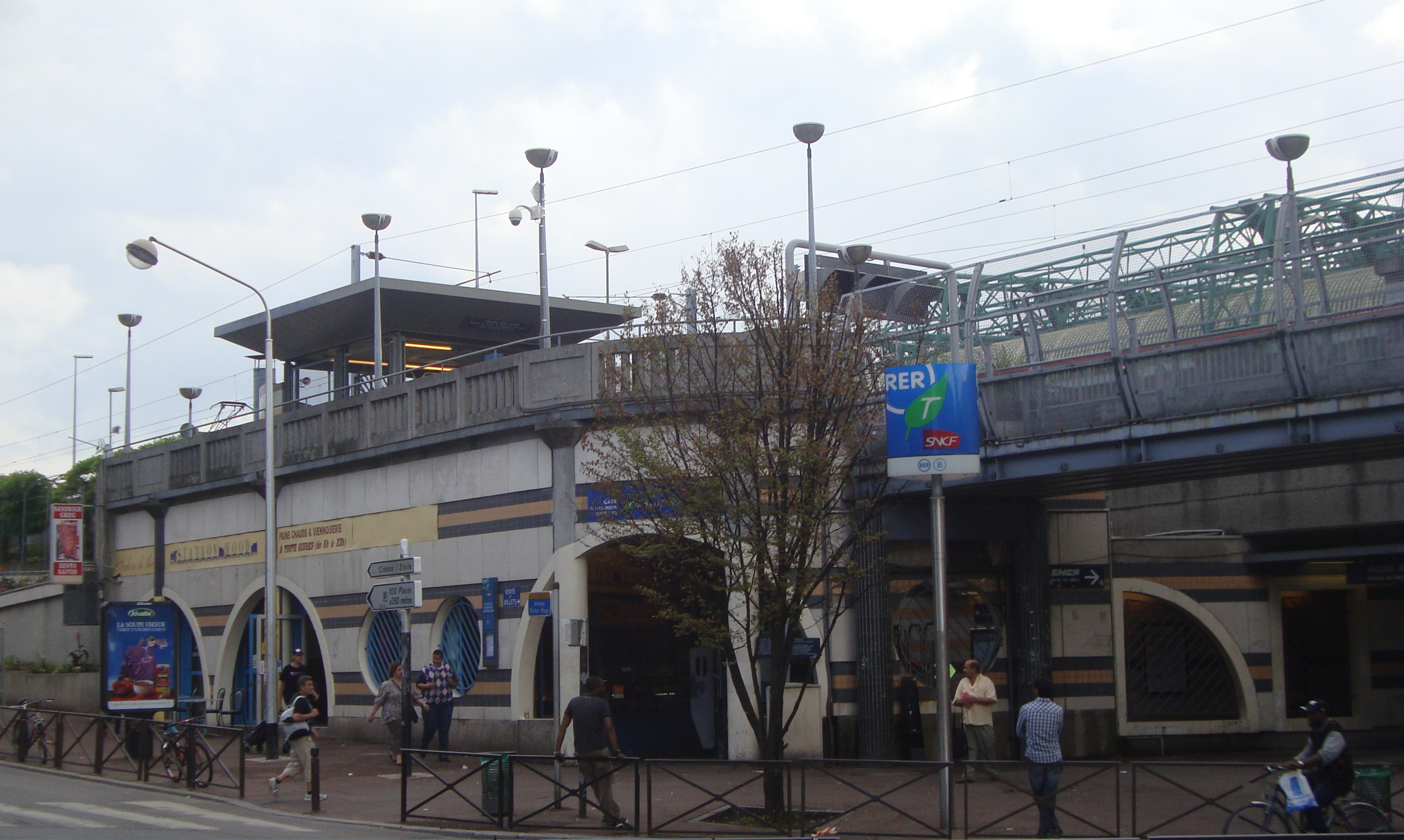 La gare RER B La Courneuve-Aubervilliers vue du boulevard Pasteur